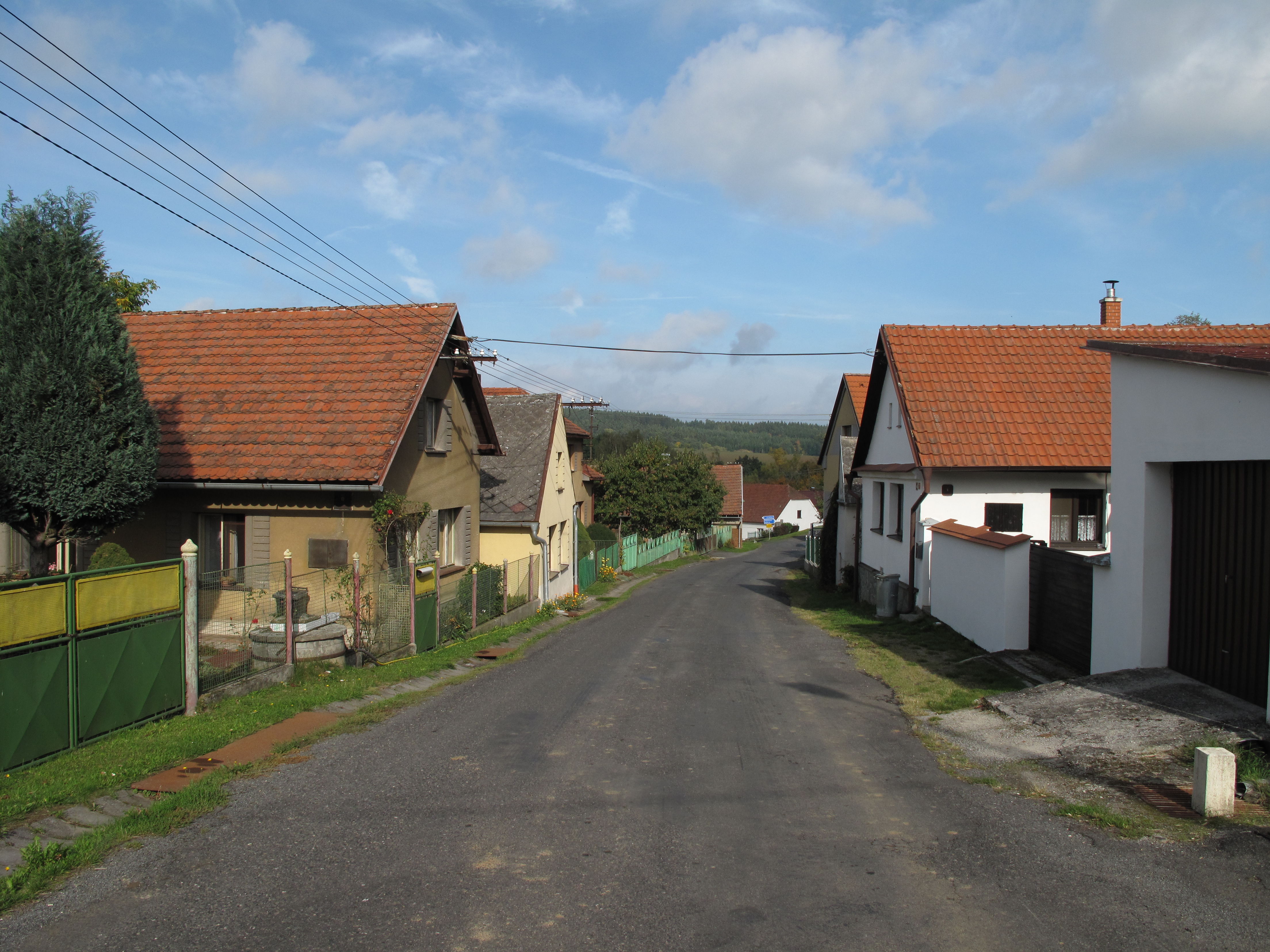 Křenice. Okres Klatovy, Česká republika.